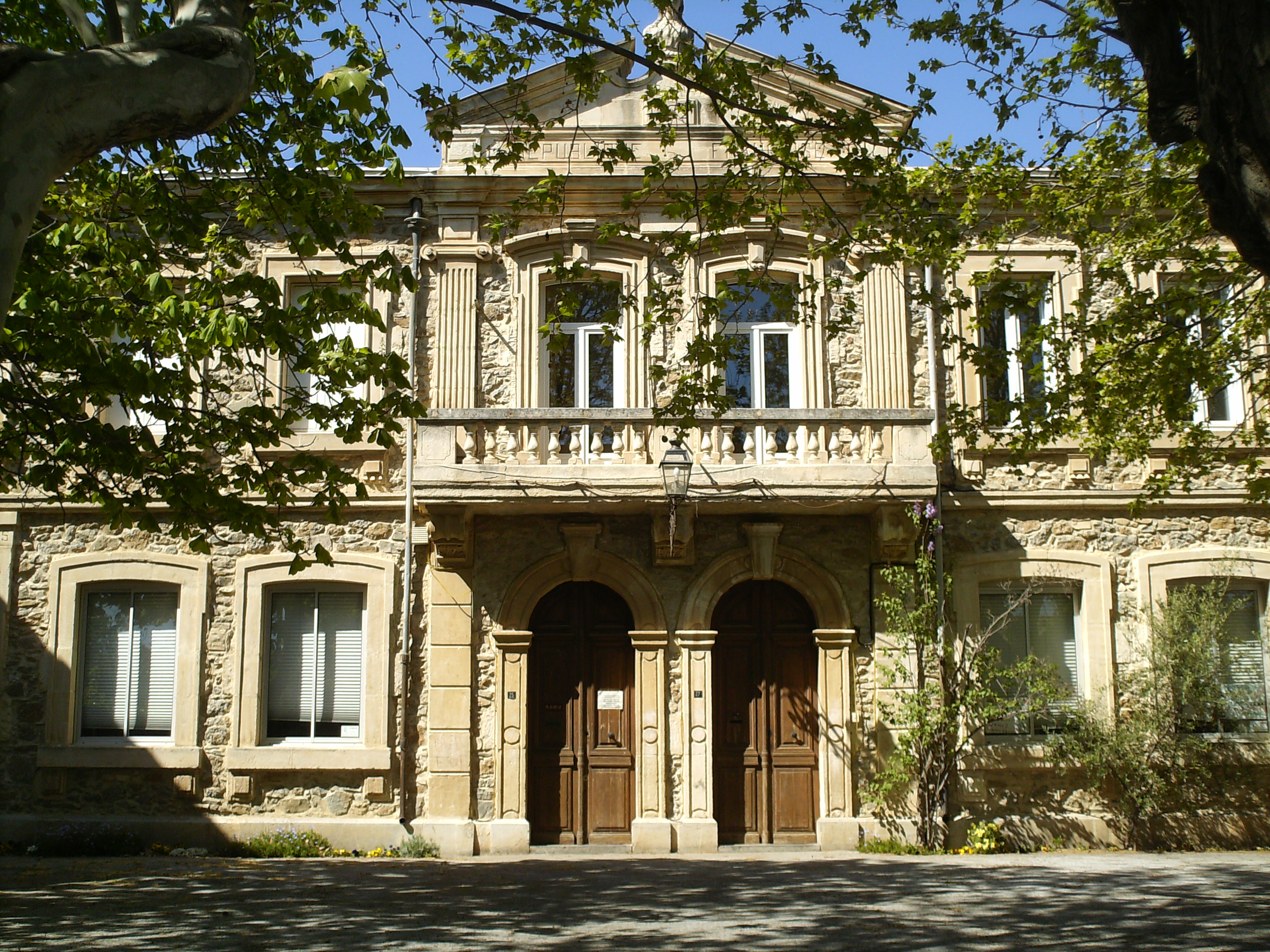 La Mairie et l'École de Pouzols-Minervois